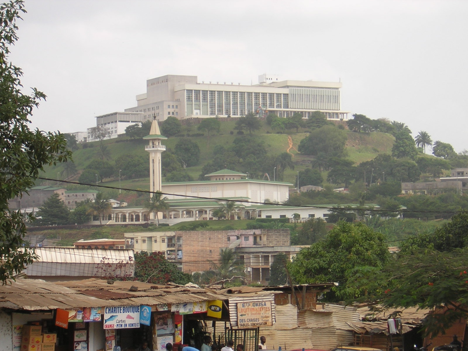 In Yaoundé, Hauptstadt von Kamerun: Die Kongresshalle (Foren, Seminaren und Konferenz) und die große Moschee im Viertel Brique